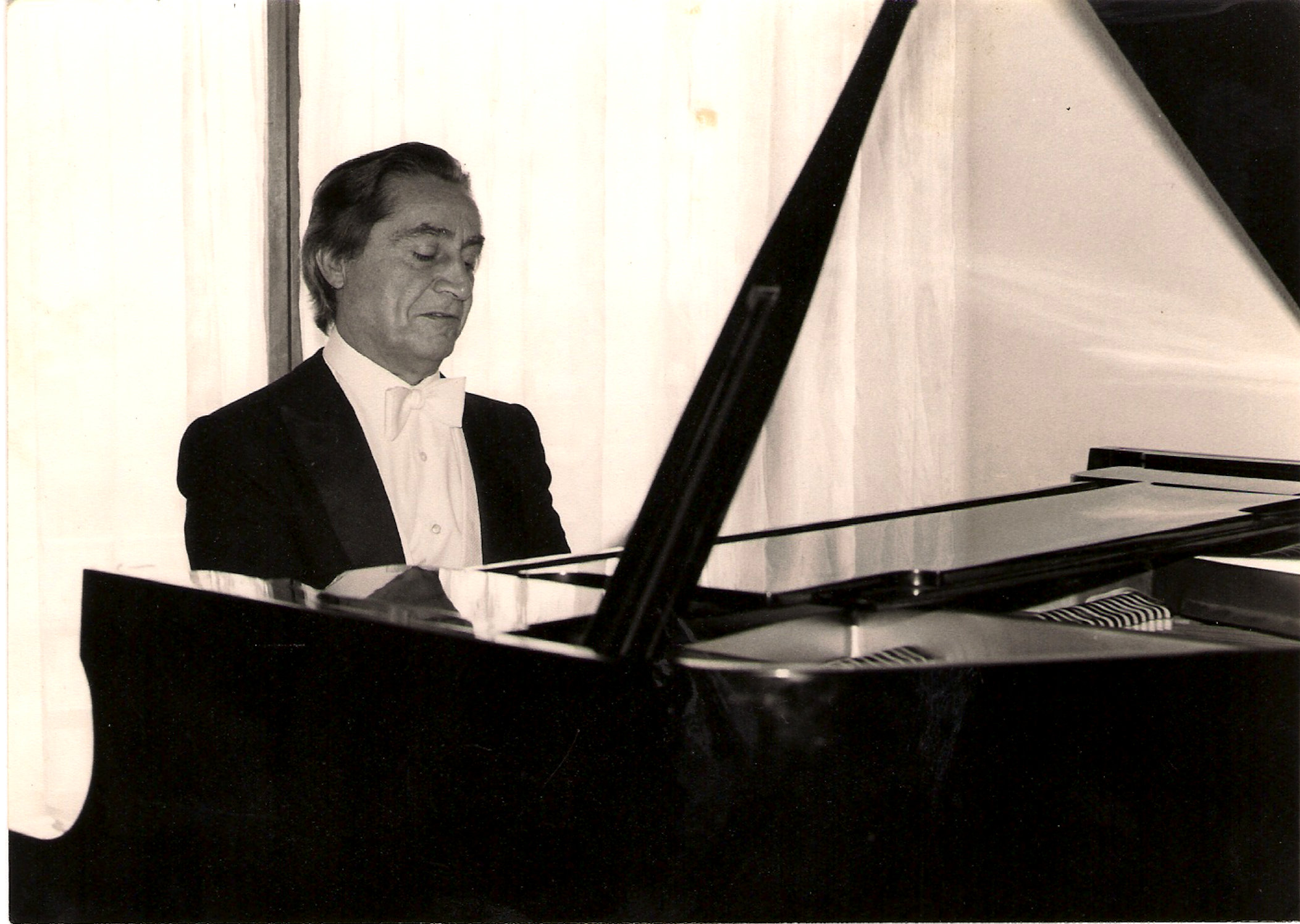 José Ortiga al piano